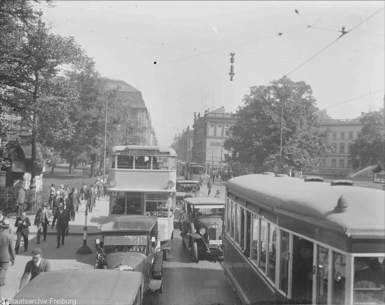 Leipziger Platz in Berlin